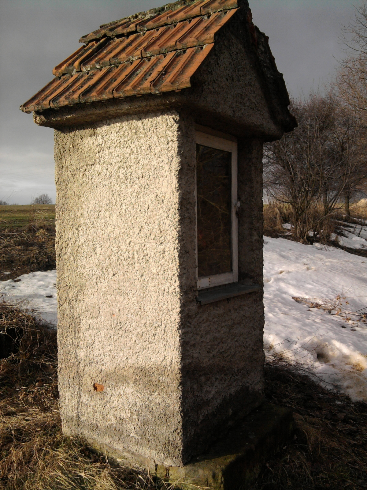 Celkový pohled na boží muka sv. Petra a Pavla v Rájci.